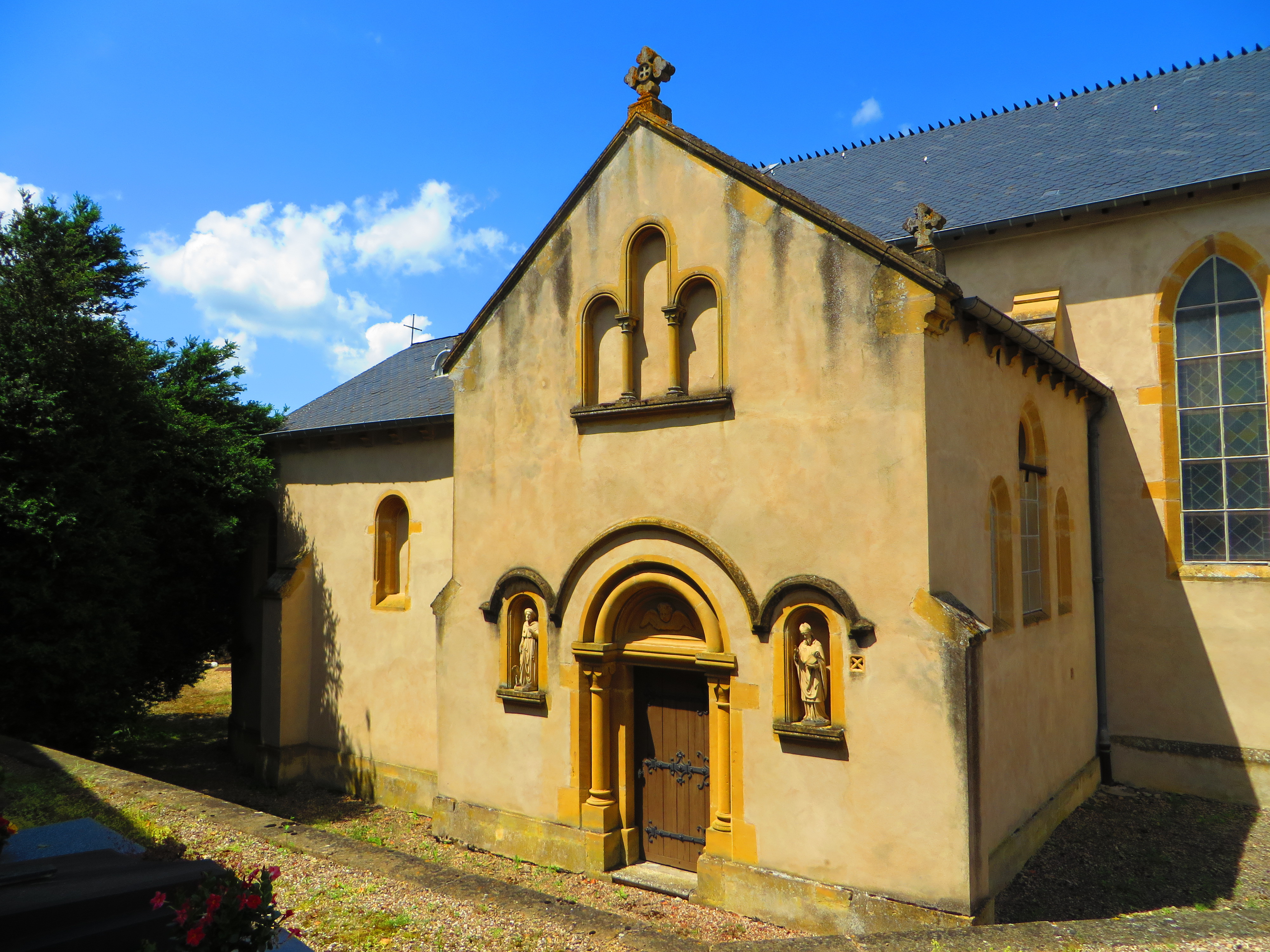 Cherisey Chapelle castrale